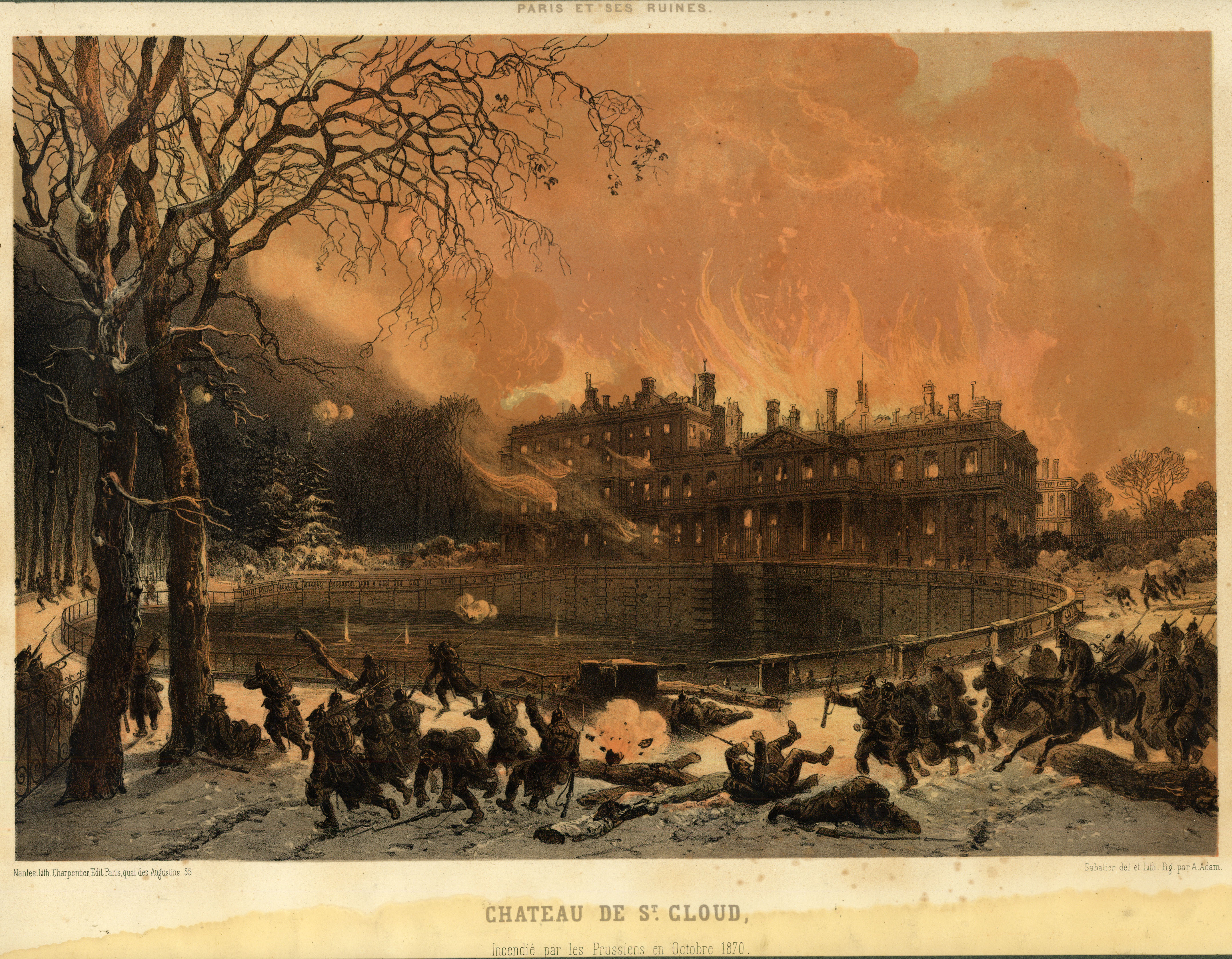 Incendie du château de Saint-Cloud et fuite des troupes Prussiennes